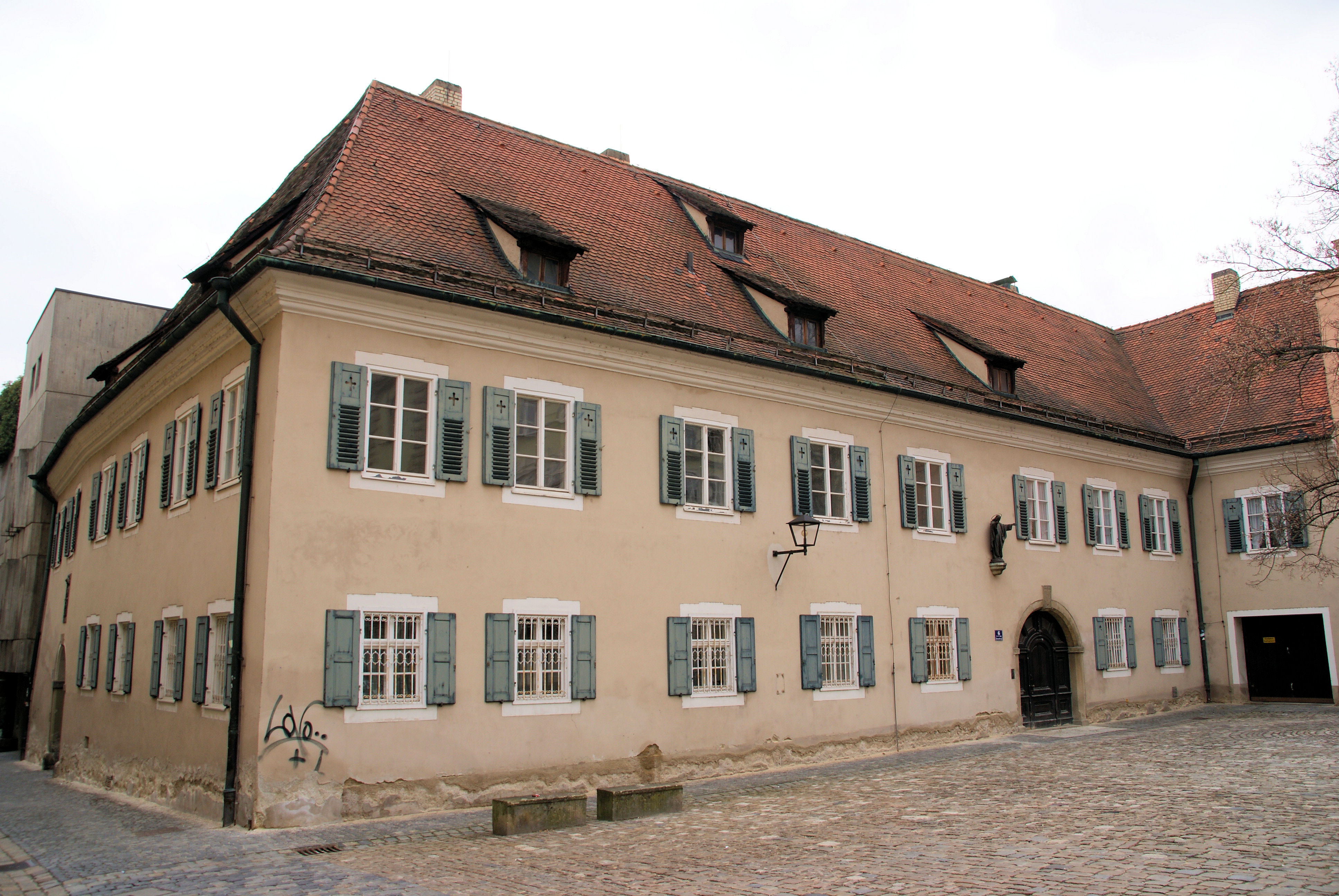 Dompropstei, ehem. Domdechantei, langgestreckte zweigeschossige Dreiflügelanlage mit Walmdach, am Platz Frauenbergl, in Ecklage zur Salzburger-Gasse, spätbarock, spätes 18. Jh., über mittelalterlichen Kellern, um 1250 und 14./15. Jh., zusammen mit Salzburger Gasse 4.This is a photograph of an architectural monument.